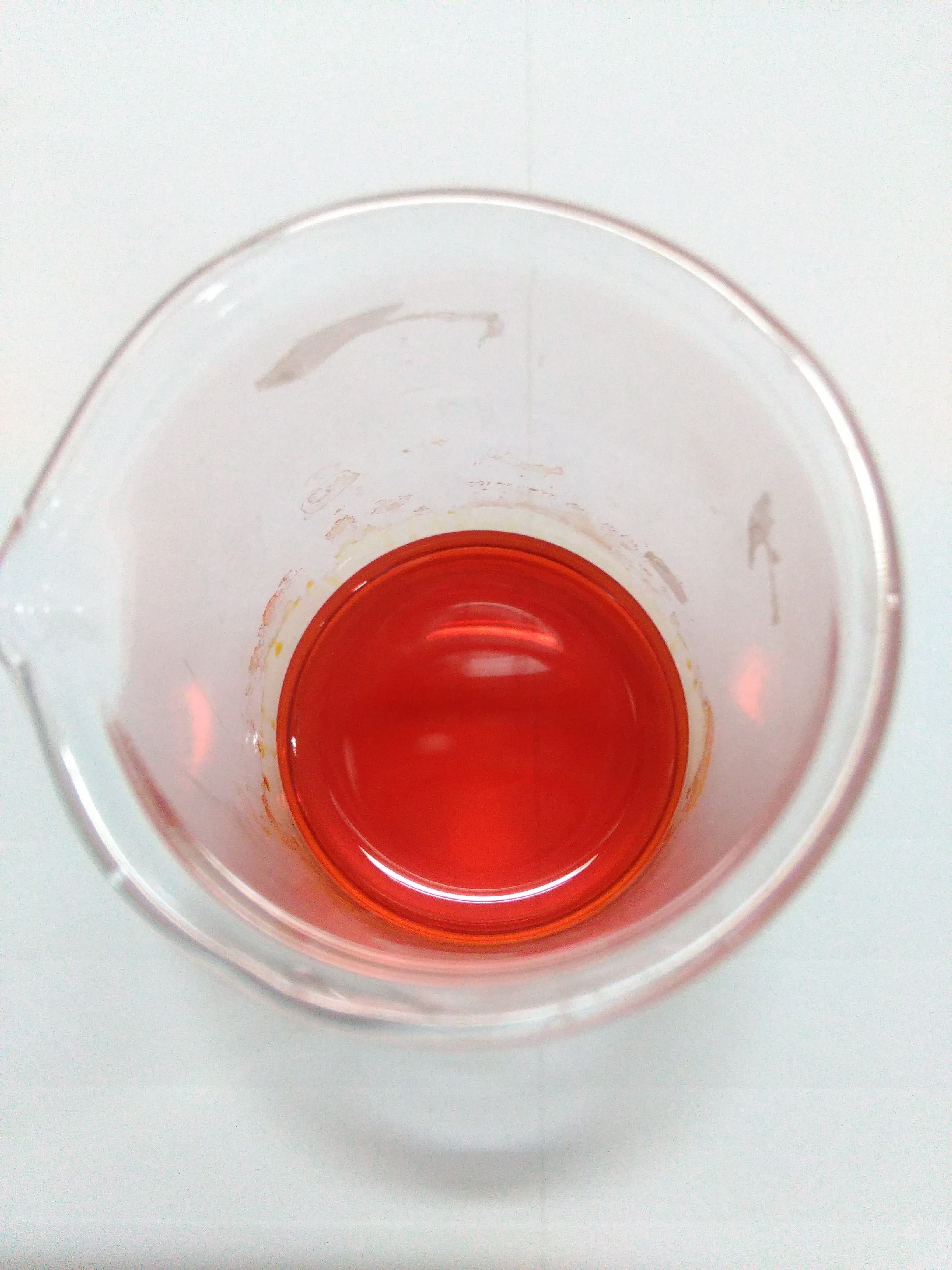 溶解在约5mL乙醇中的乙酰丙酮铁(III)（含0.070g）